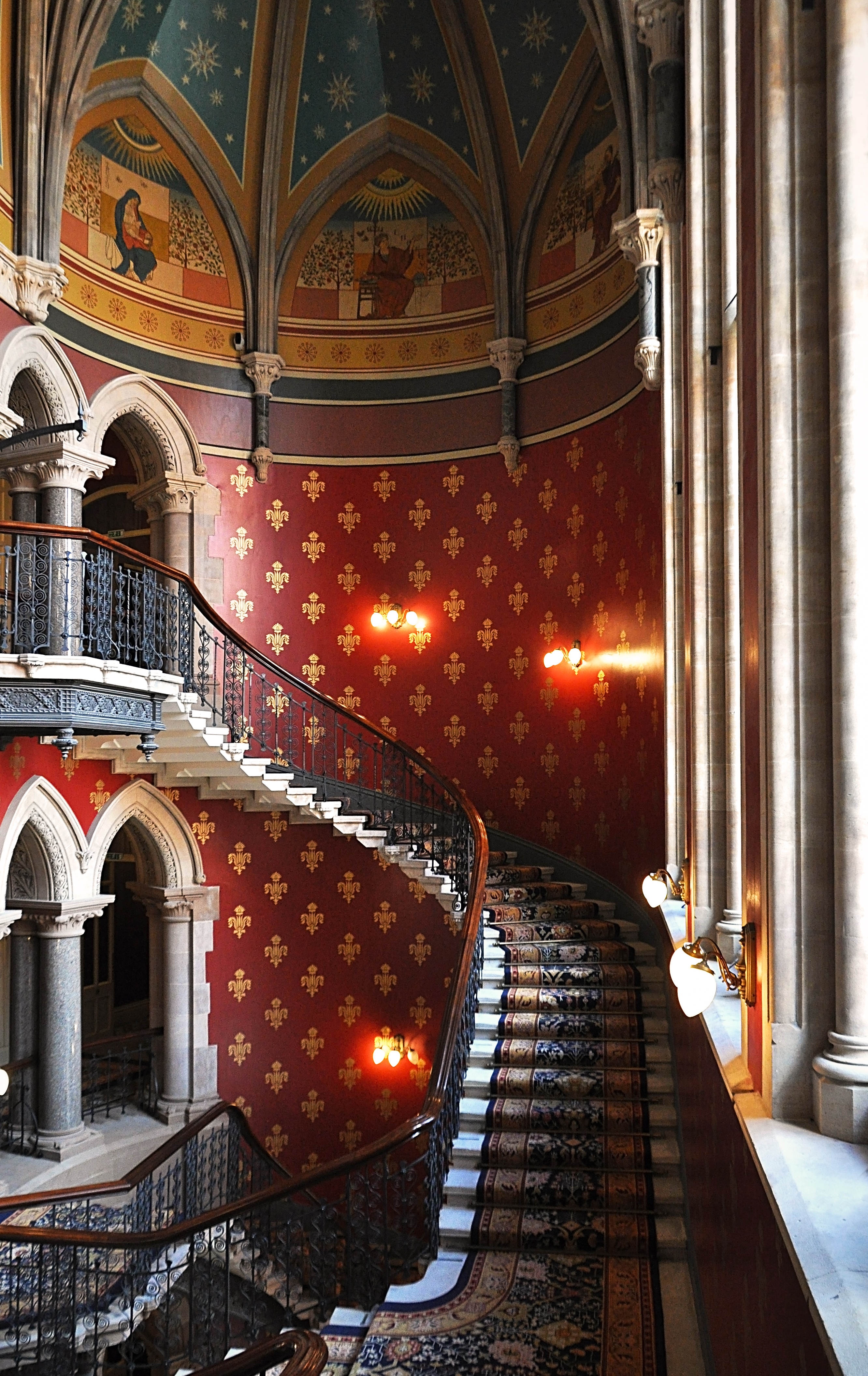 The St. Pancras Renaissance London Hotel is a hotel in London, adjacent to St Pancras railway station. It occupies greater parts of the former Midland Grand Hotel. Architect was George Gilbert Scott.